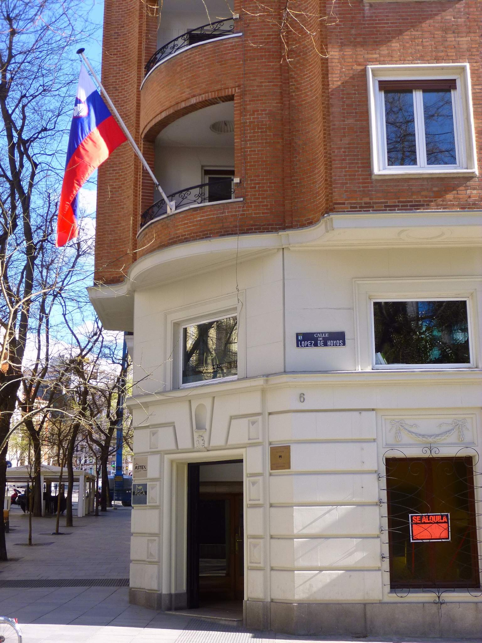 Madrid - Embajada de Eslovenia.